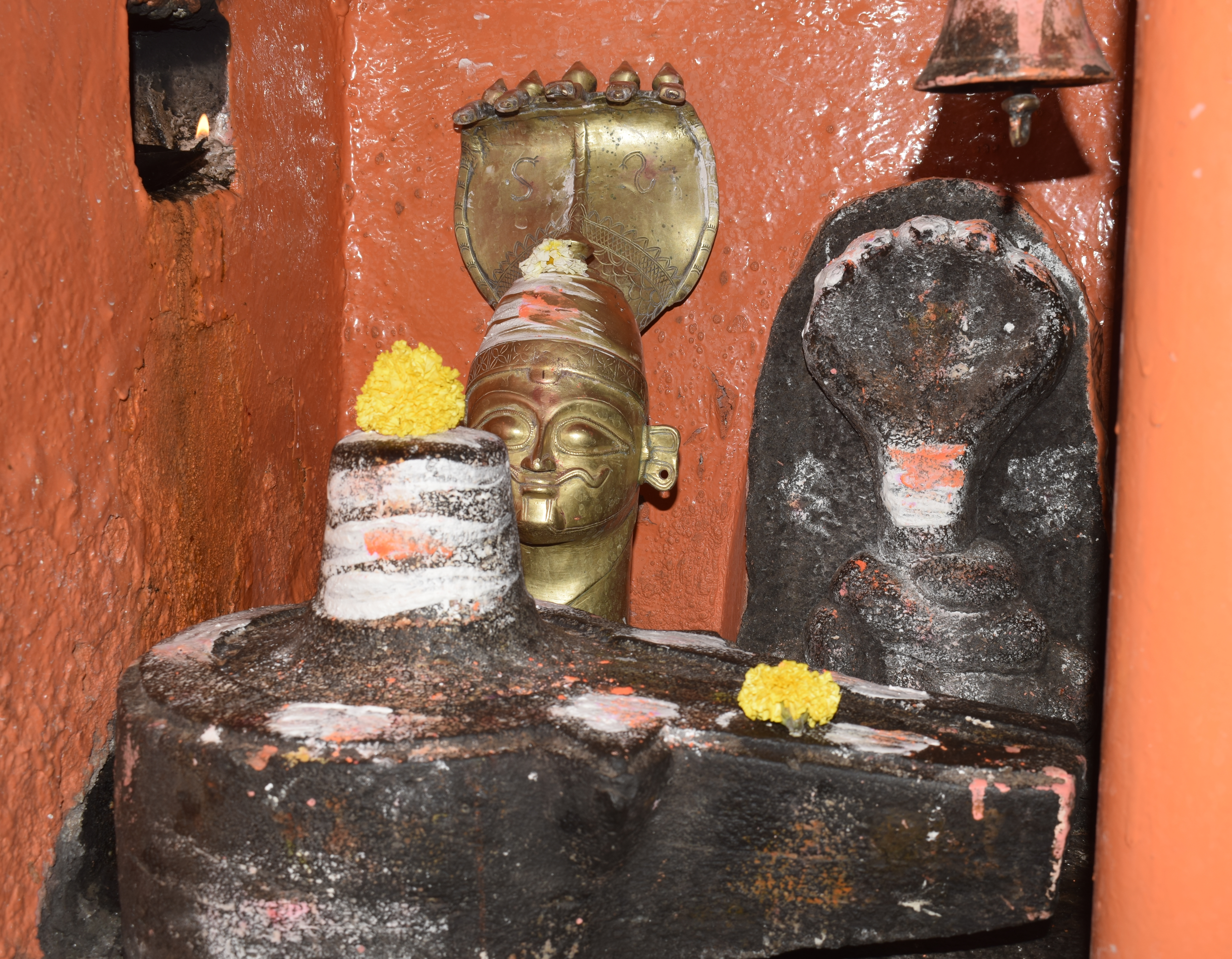 श्री चिन्हेश्वर लिंग